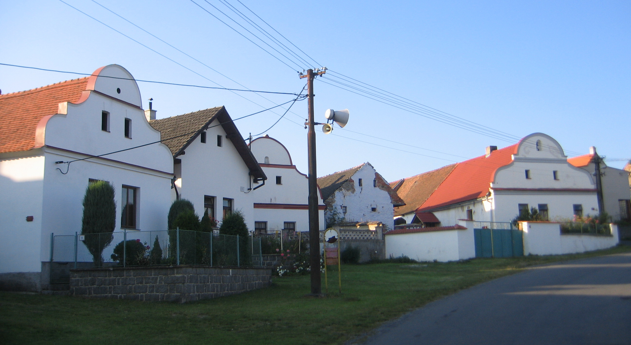 Venkovská usedlost (Břežany), náves 1, Břežany